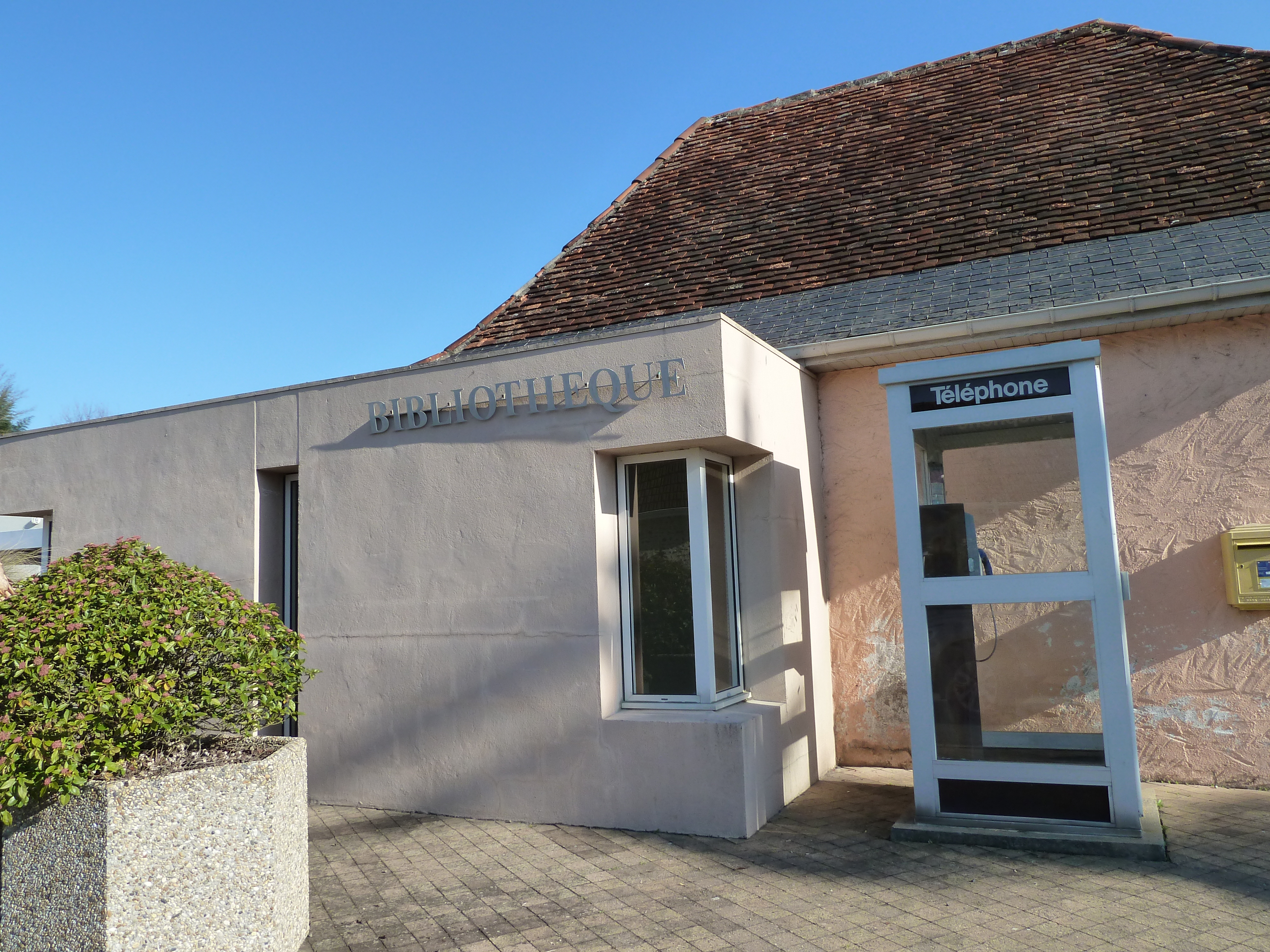 Bibliothèque et cabine téléphonique de Poey-de-Lescar